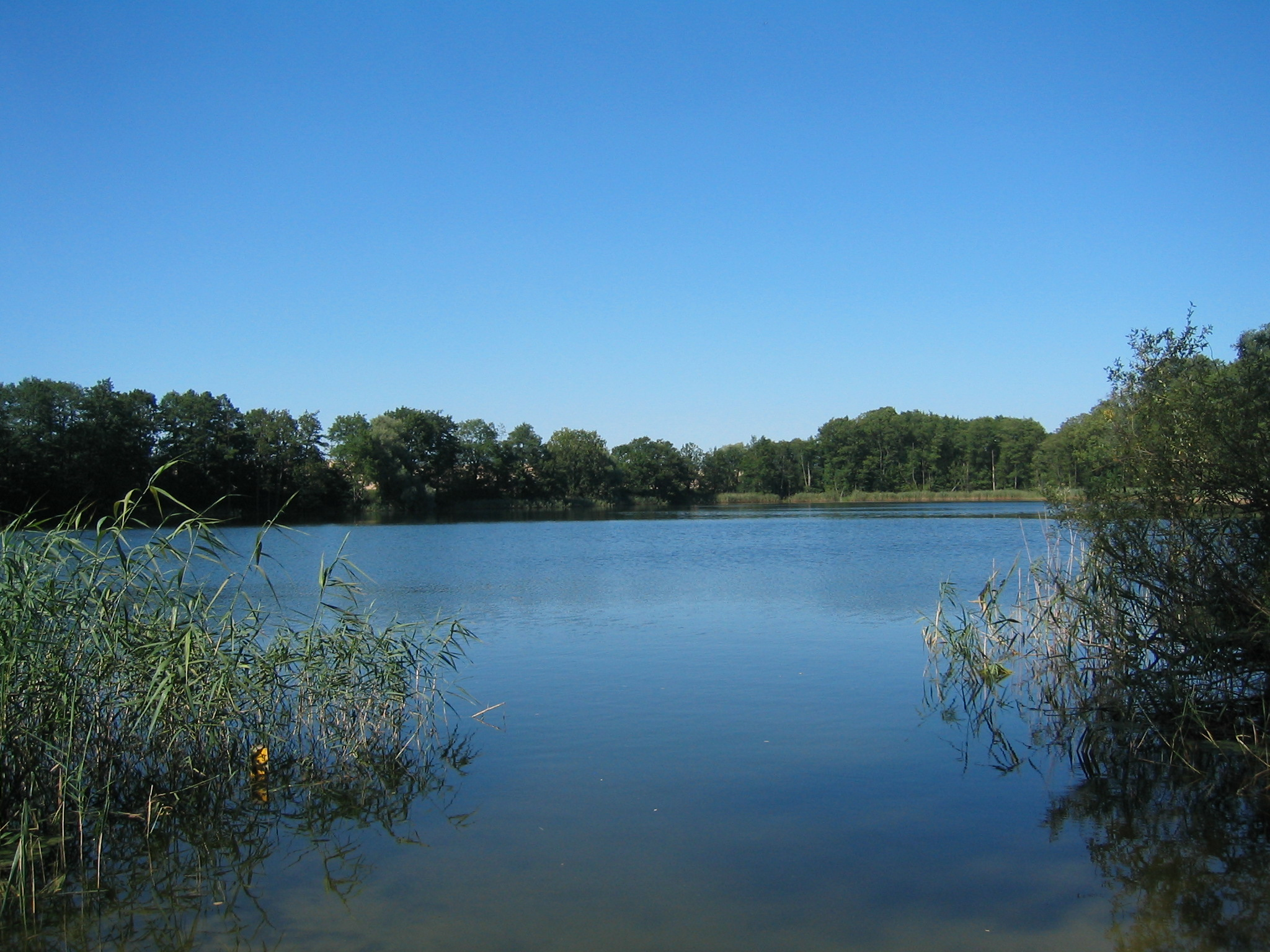 Klarersee bei Dreesch